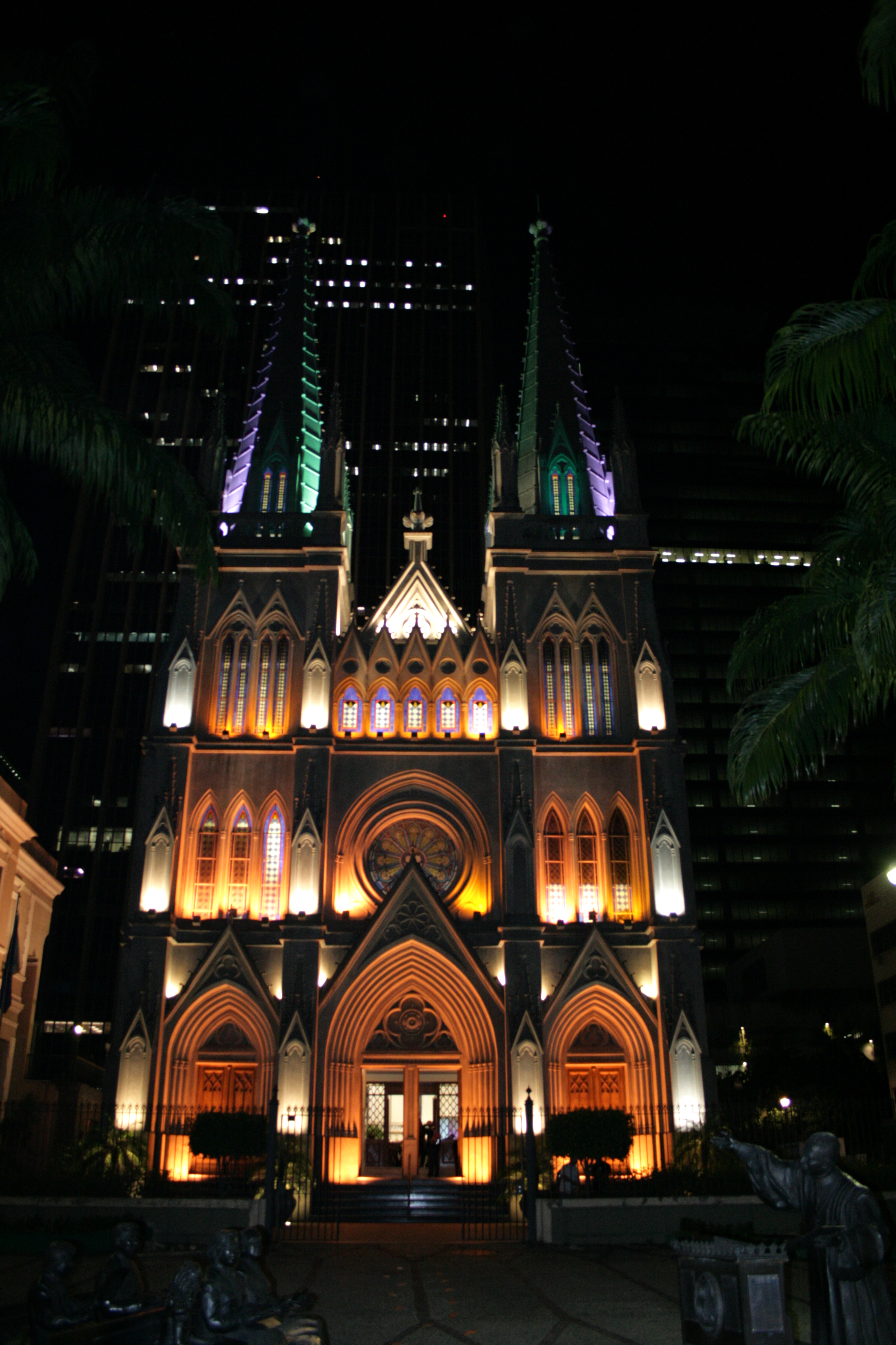 Presbiterian Cathedral Rio de Janeiro - Brasil mip mani